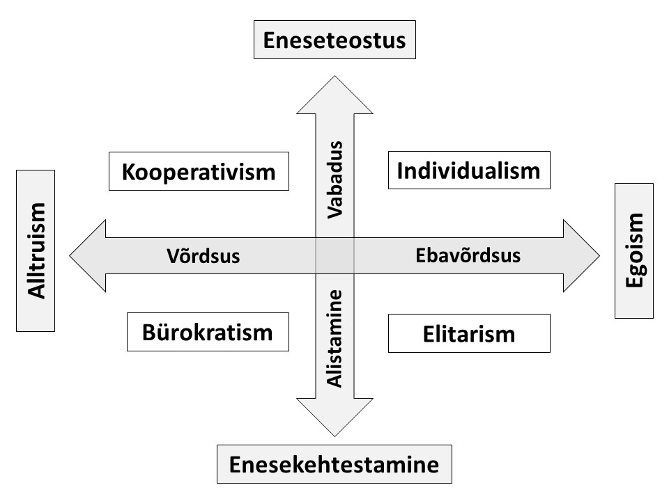 Neli sotsiaalset korda, mis tekivad kahedimensioonilisest käsitlusest.